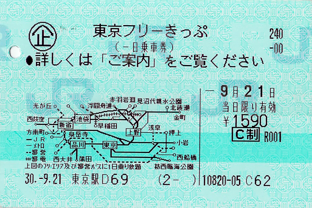 東日本旅客鉄道（JR東日本） 東京フリーきっぷ